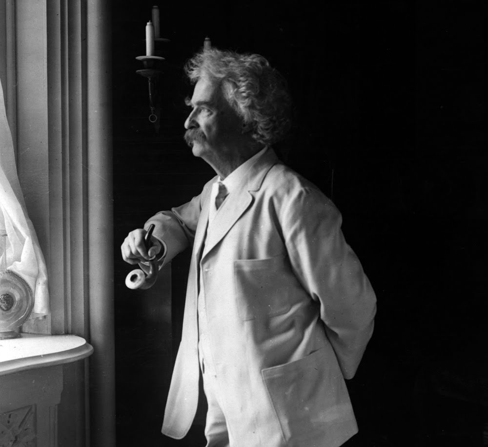 Mark Twain